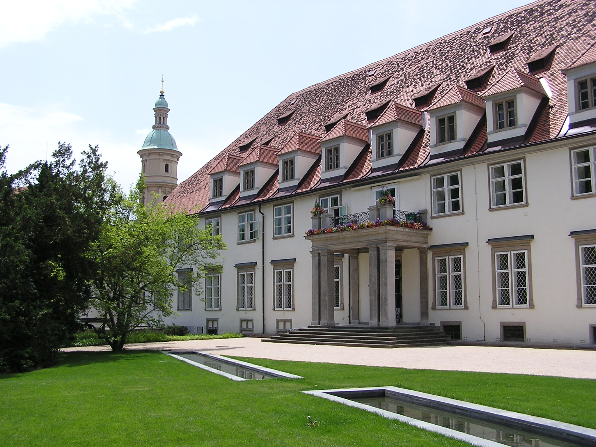 Grazer Burg (vom Burggarten aus gesehen) - Castle of Graz (seen from the Burggarten)